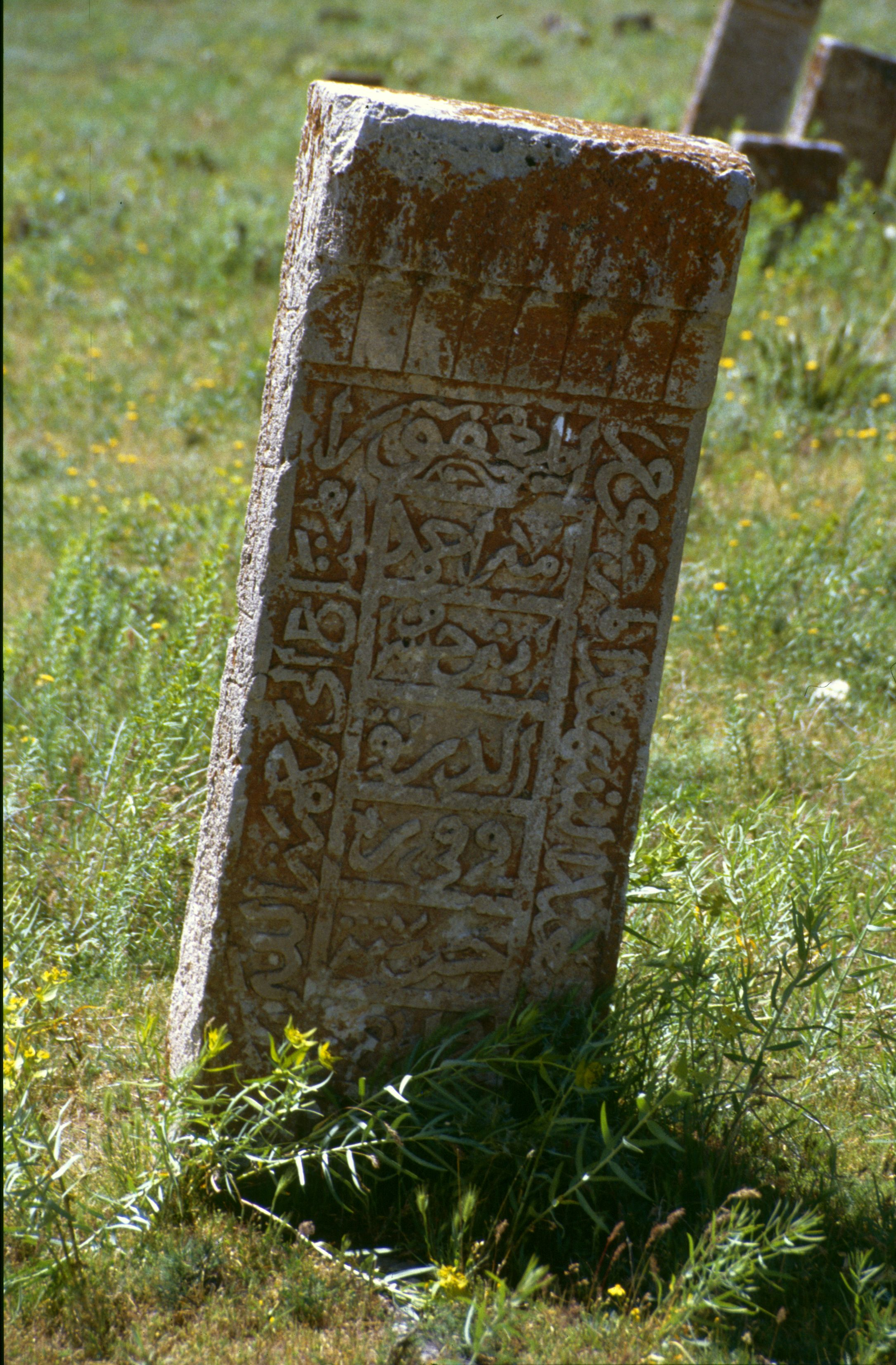 Gevaş: seldchukischer Grabstein